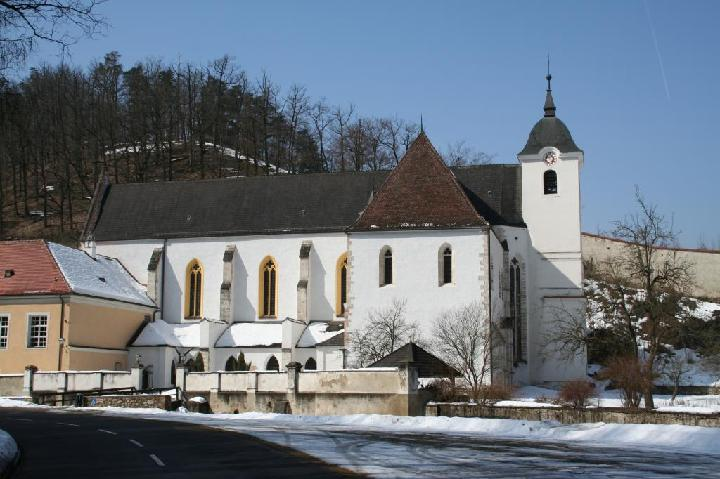 Kartausenkirche Aggsbach im Winter